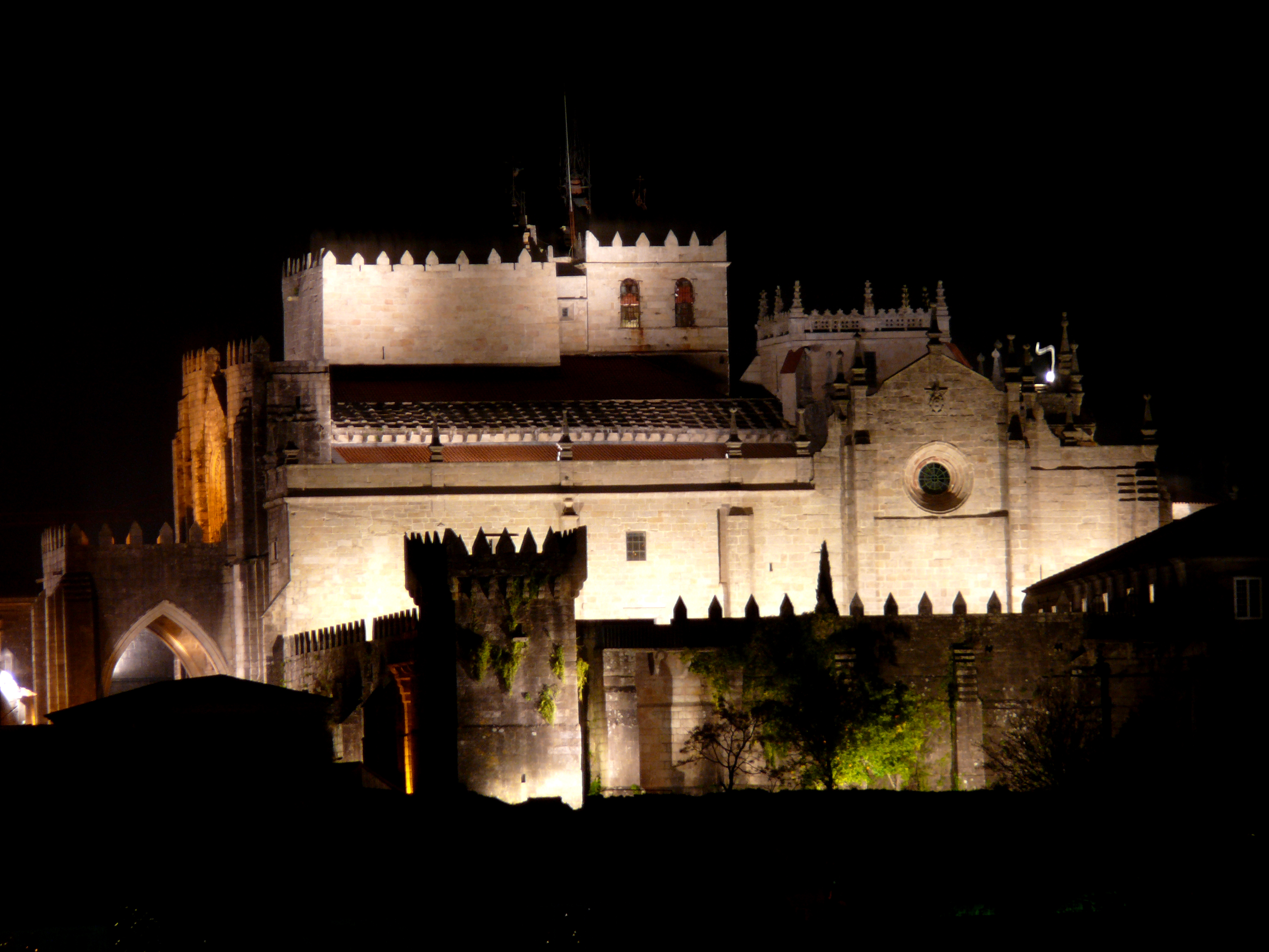 La catedral vista por la noche